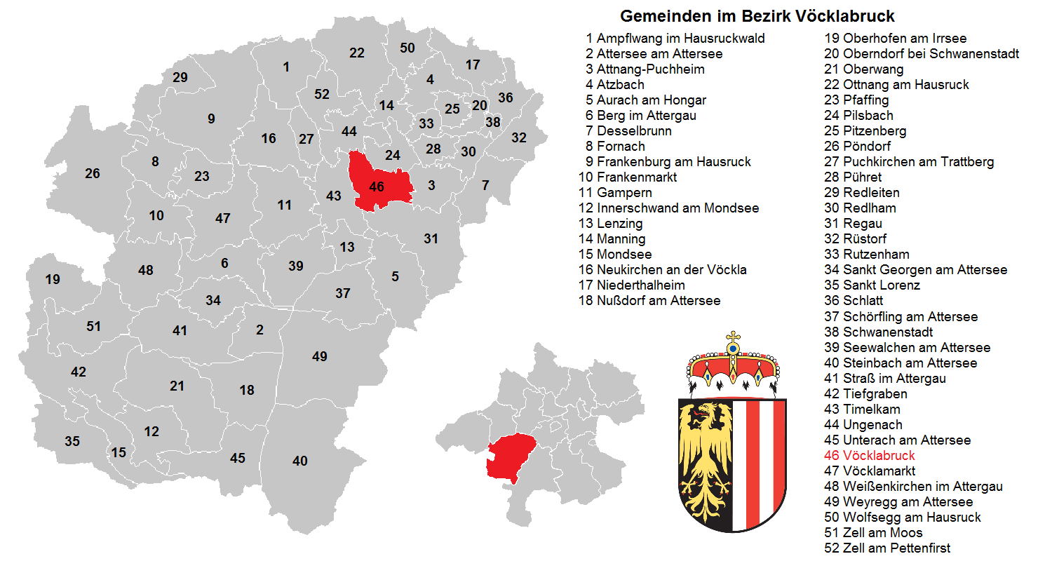 Bezirk Vöcklabruck